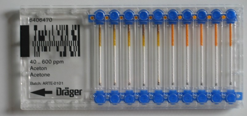 CMS-Chip Aceton der Firma Dräger